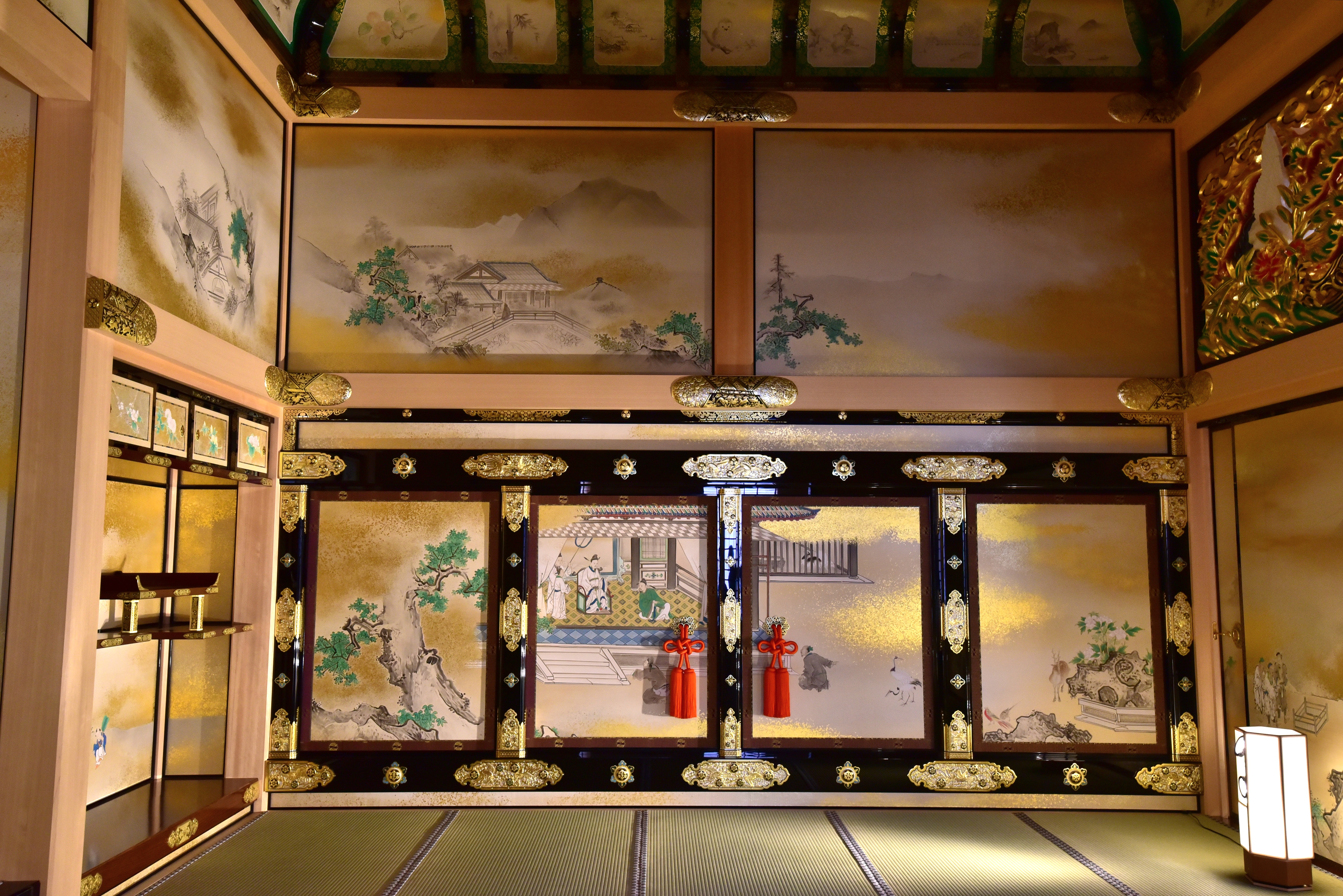 名古屋城本丸御殿の上洛殿上段之間にある帳台構え